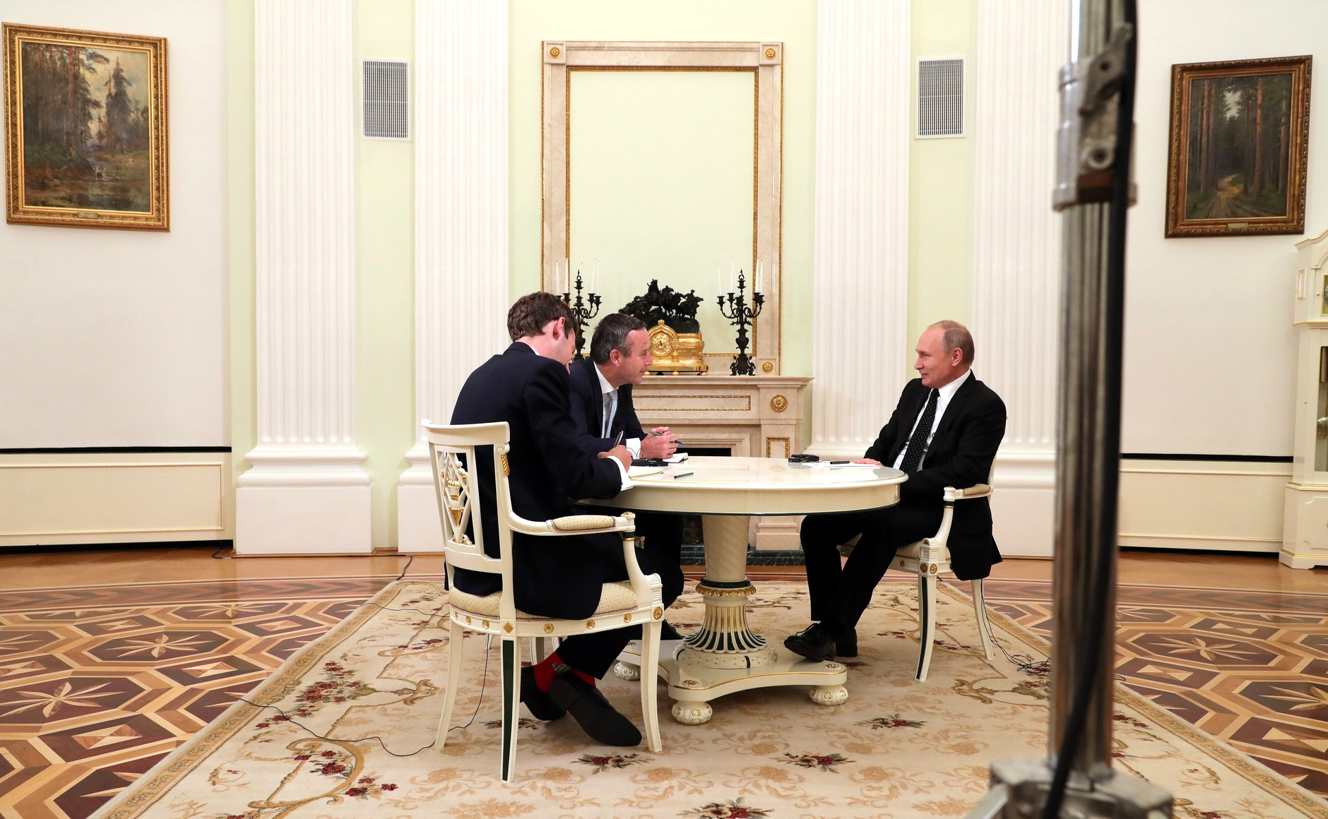 Интервью газете The Financial Times.